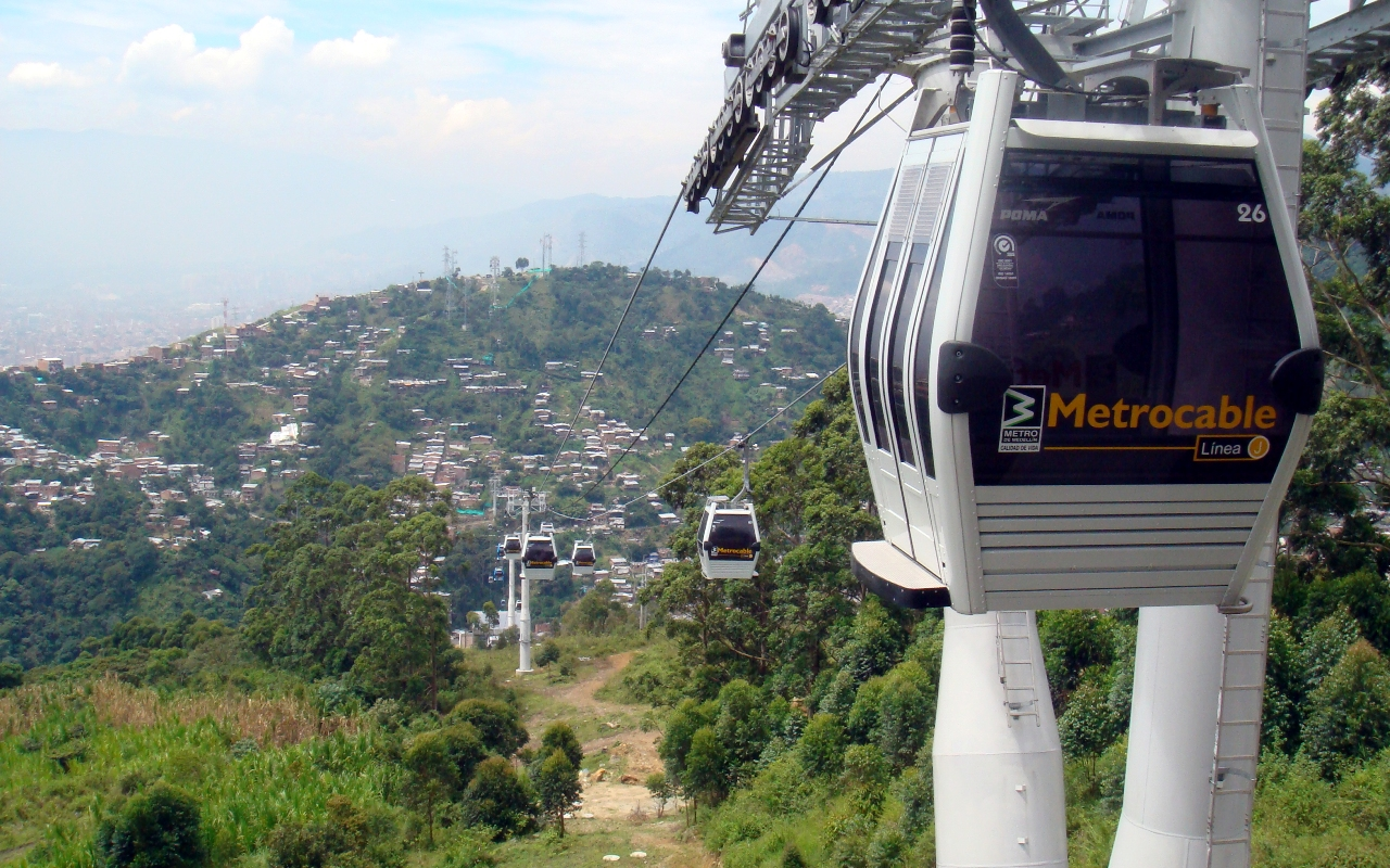 Desde el Metro Cable